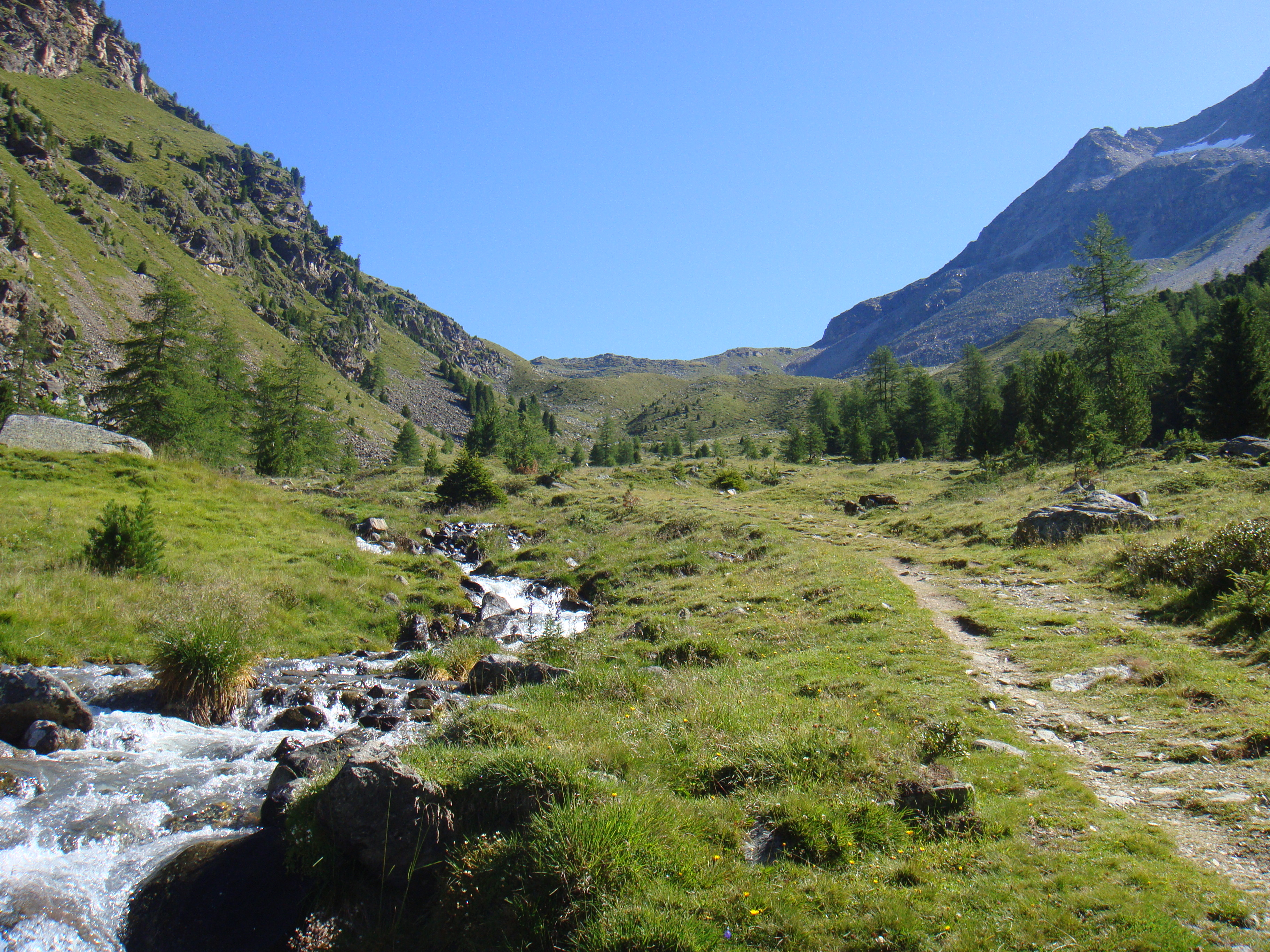 Valle di Zay, Solda, Italia.